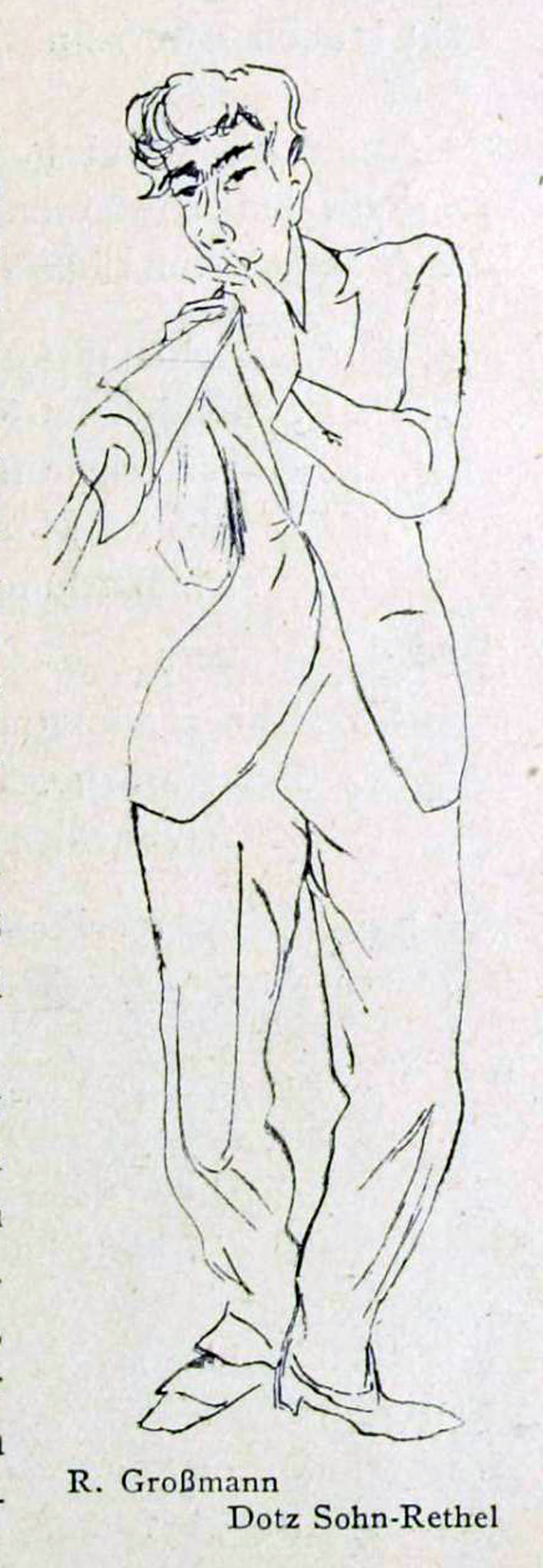 Dotz Sohn-Rethel; Zeichnung von Rudolf Großmann (1882-1941), in Der Querschnitt, Heft 1, Januar 1927